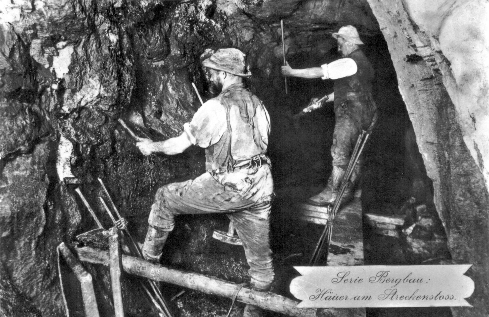 Häuer am Streckenstoß